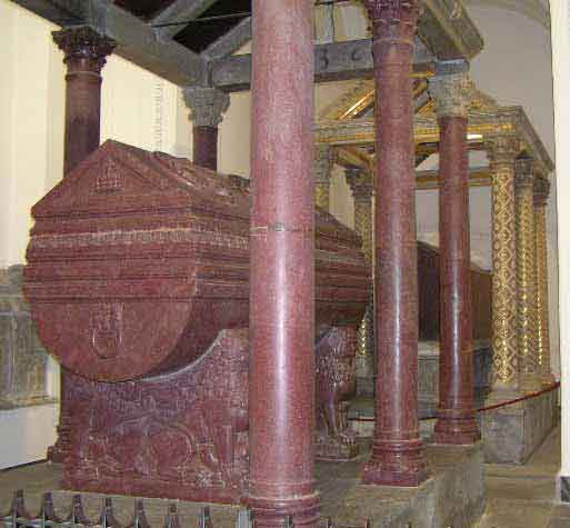 Sarkophag von Friedrich II. (HRR) (im Hintergrund der von Roger II) Sarcofago di Federico II, Palermo